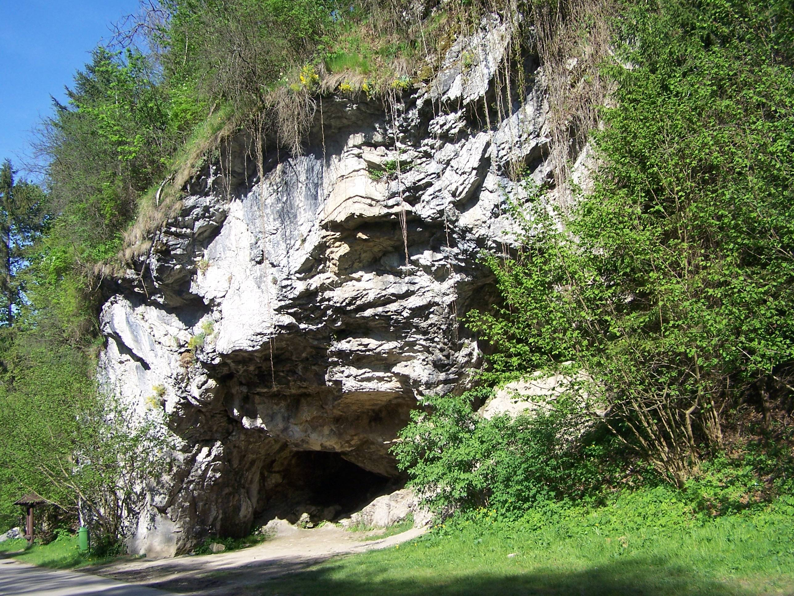 Skała Zyblikiewicza (Droga Pienińska w Szczawnicy)